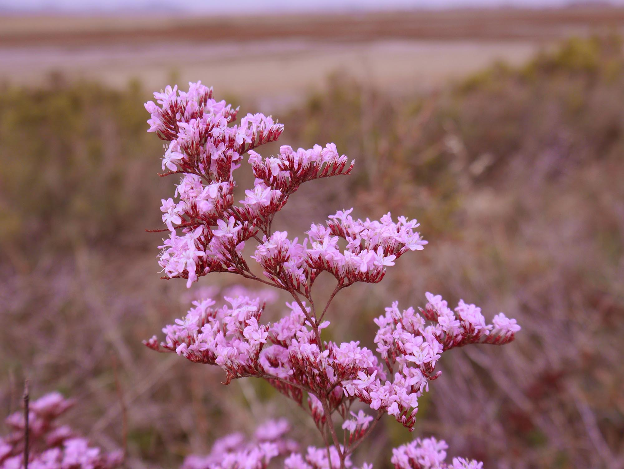 Limonium caesium en floración en abril en el saladar de Lo Poyo, junto al Mar Menor, Cartagena (España).